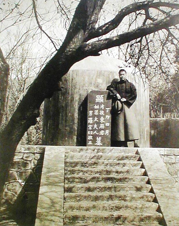 程砚秋在恩师罗瘿公的墓前